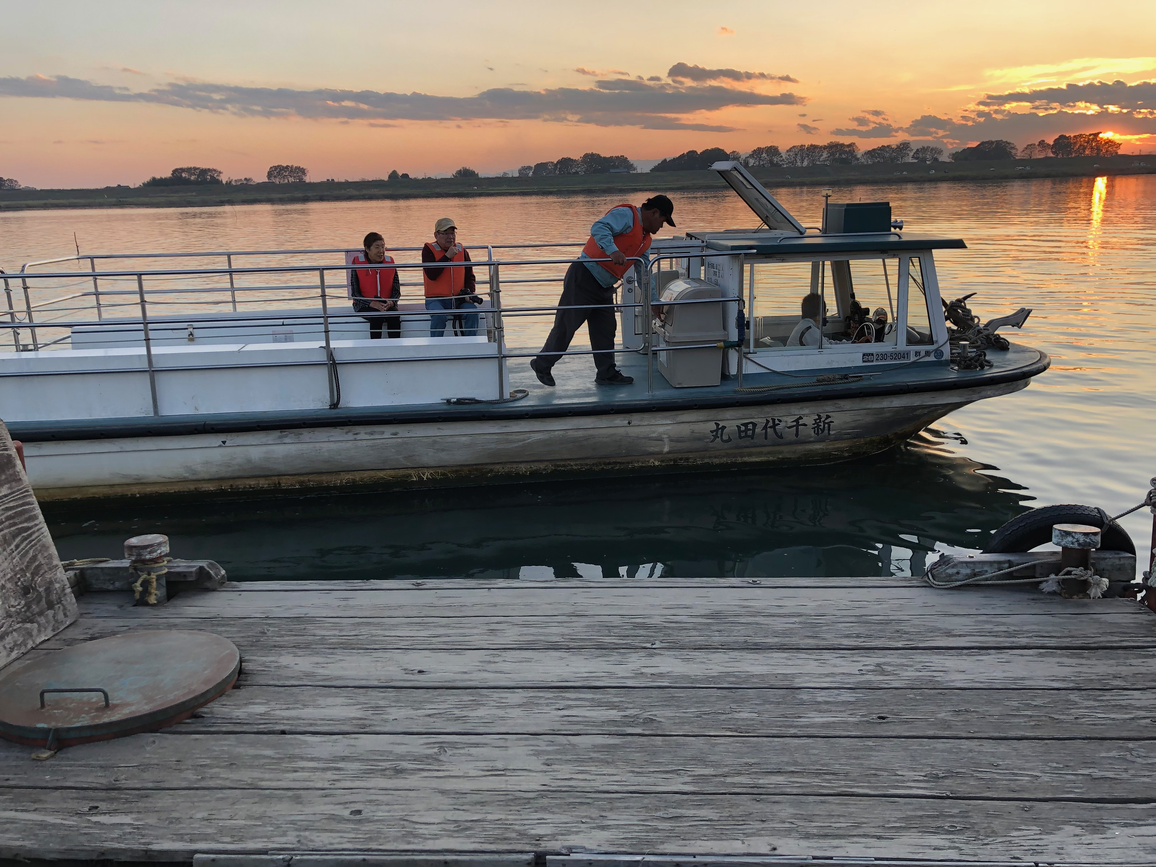 赤岩渡船の新千代田丸